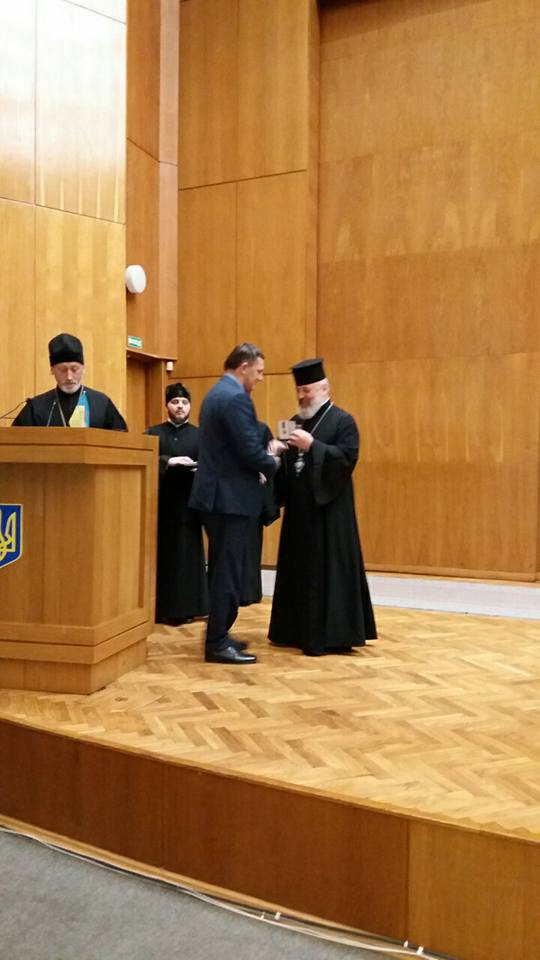 вручення грамоти